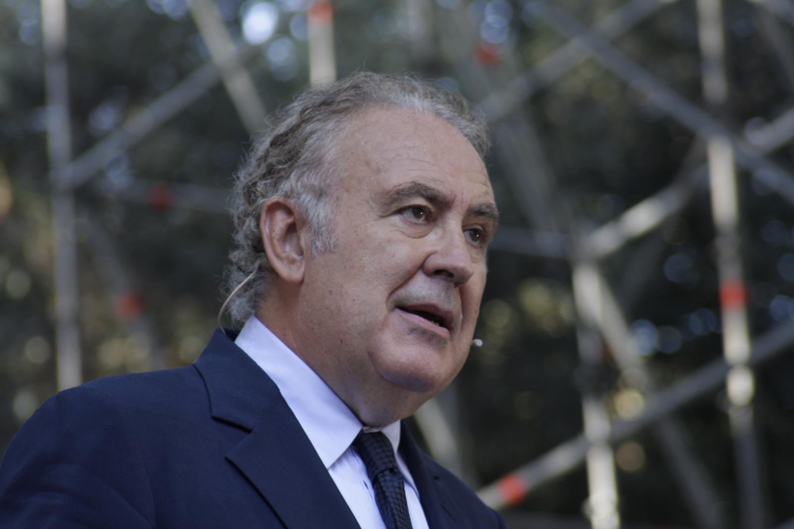 Michele Santoro alla Festa 2011 del Fatto Quotidiano alla Versiliana